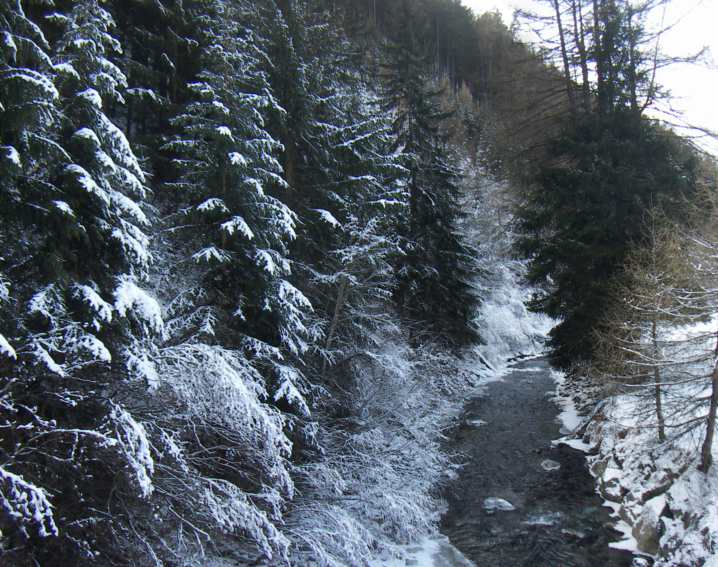 Bach in Langtaufers